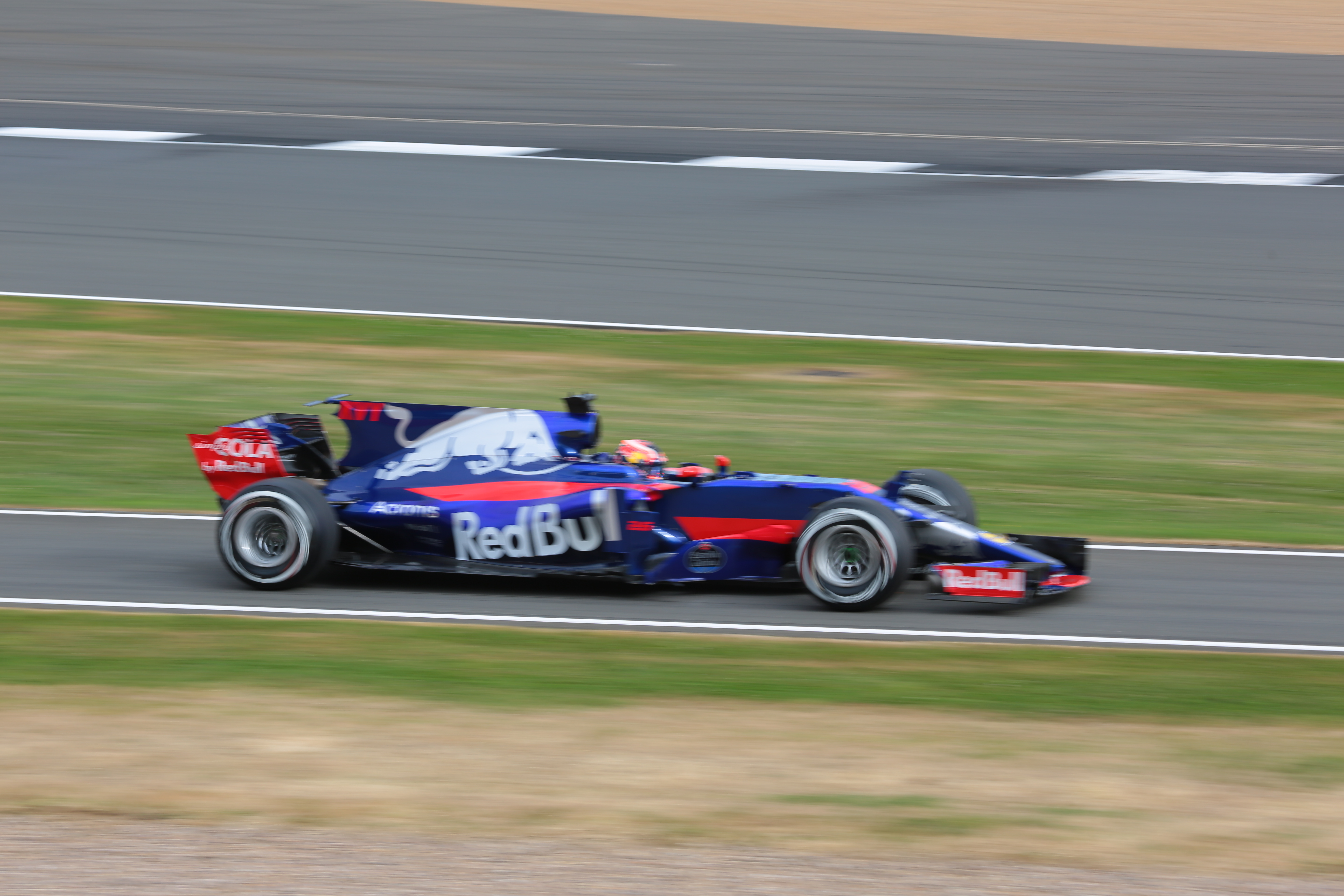 f1